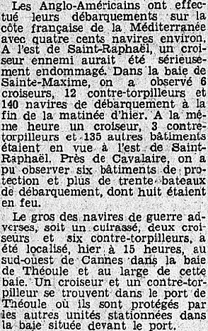 Le débarquement du 16 août 1944 raconté par le journal Le Matin, alors journal collaborateur, qui reprend un communiqué allemand venu de Berlin (les navires qualifiés d'adverses sont donc les navires alliés).